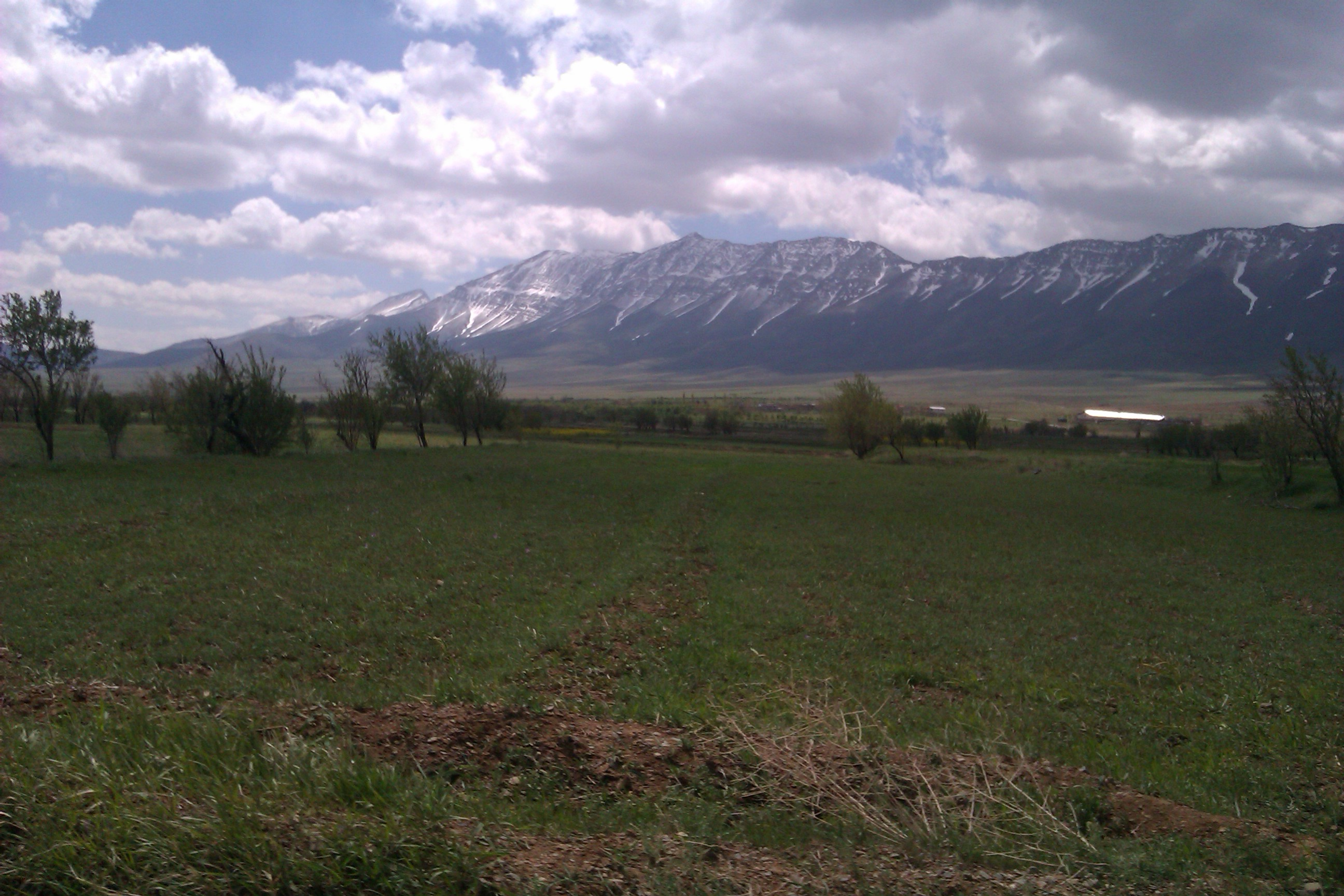 رشته کوههای کمر بسته روستای فرج آباد